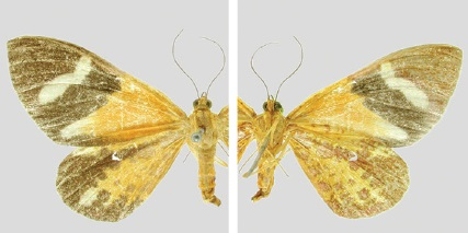 Hagnagora croceitincta